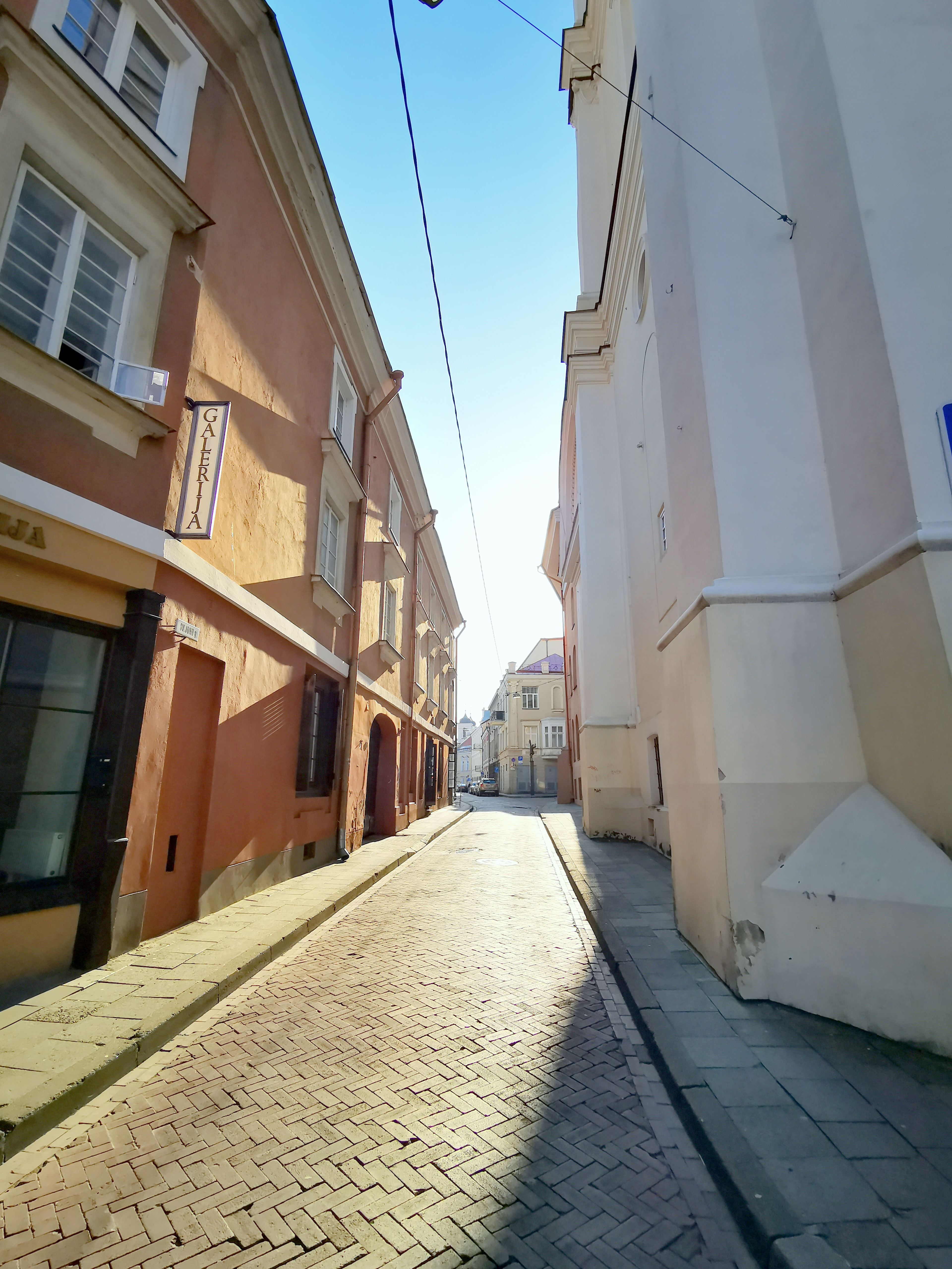 Švento Jono gatvė